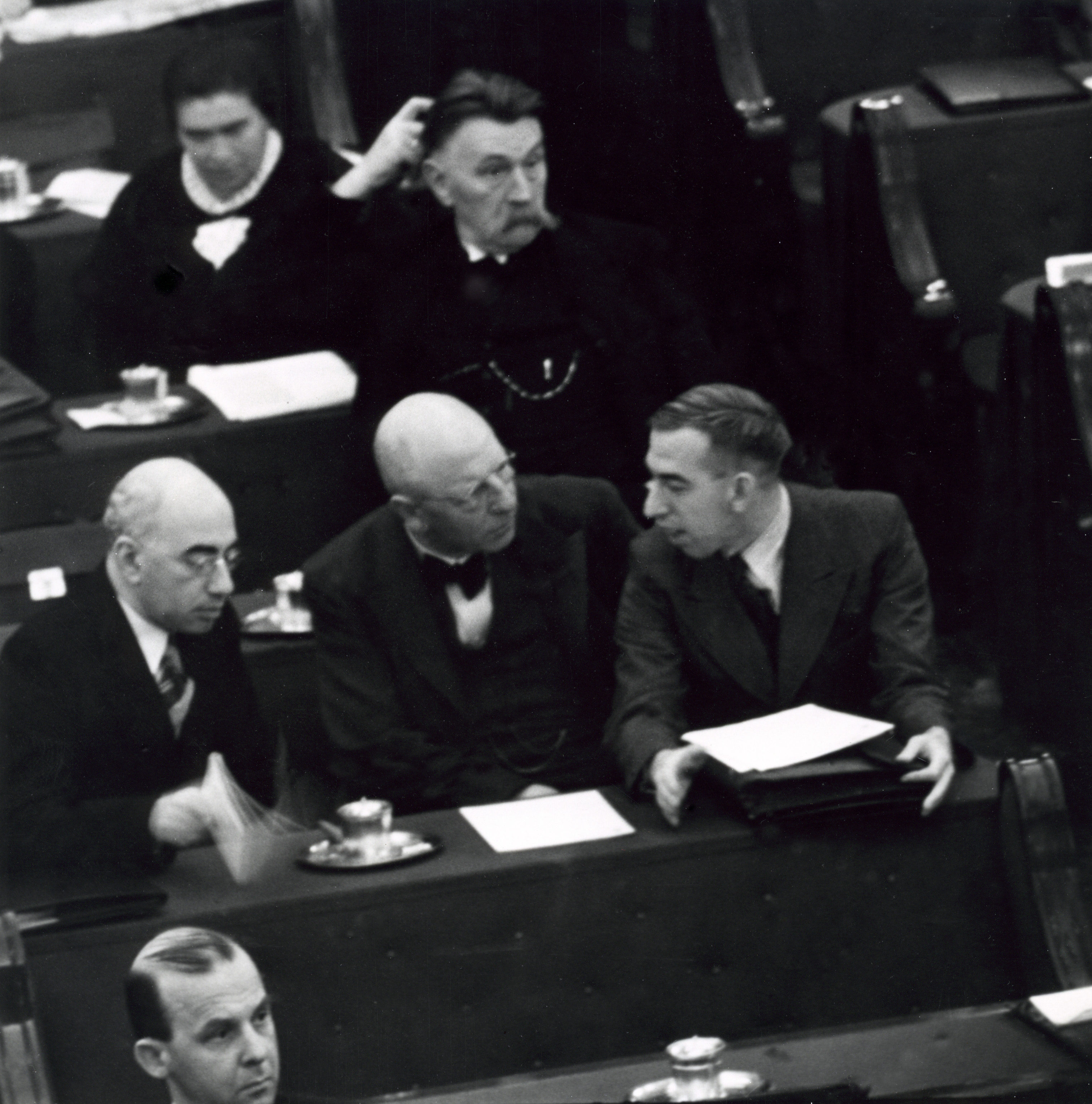 Parlement, kamerleden. Een gedeelte van de Tweede kamerfractie van de SDAP, met onder andere schrijver/pedagoog Theo Thijssen (met snor), daarvoor rechts Hein Vos en in het midden Albarda. Geheel vòòr de NSBer Rost van Tonningen. Den Haag Nederland 1937.